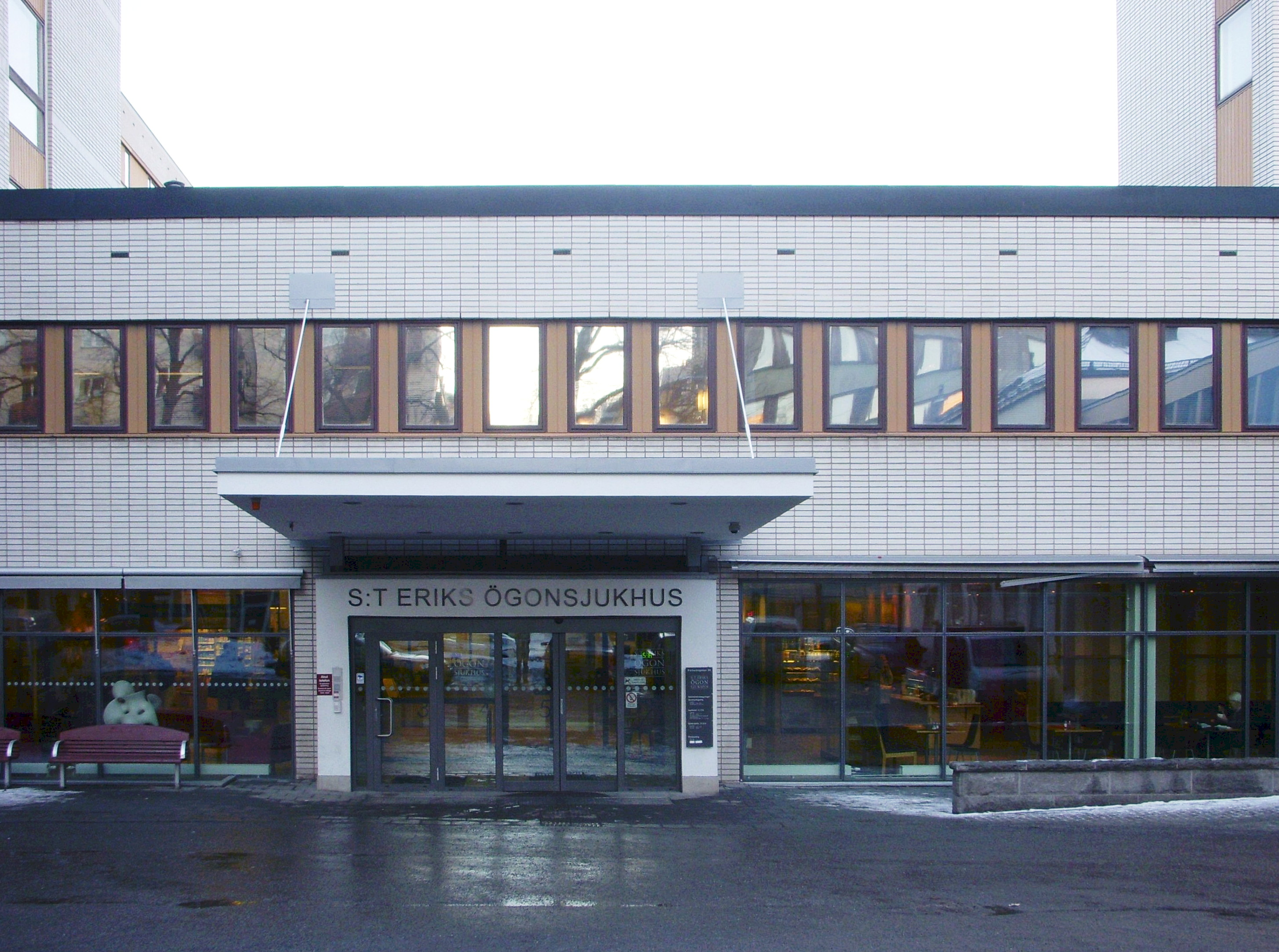 Sankt Eriks ögonsjukhus på Kungsholmen i Stockholm, entré från Fleminggatan